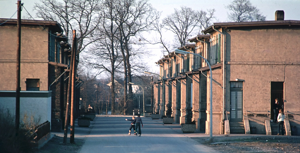 Kaiserau, ehemalige Zechensiedlung "Sektion 8", Aufnahme Ende der 1970er Jahre. Die jüngste und letzte verbliebene Sektion, heute trotz starker Veränderungen durch Sanierungsmaßnahmen denkmalgeschütztes Ensemble.